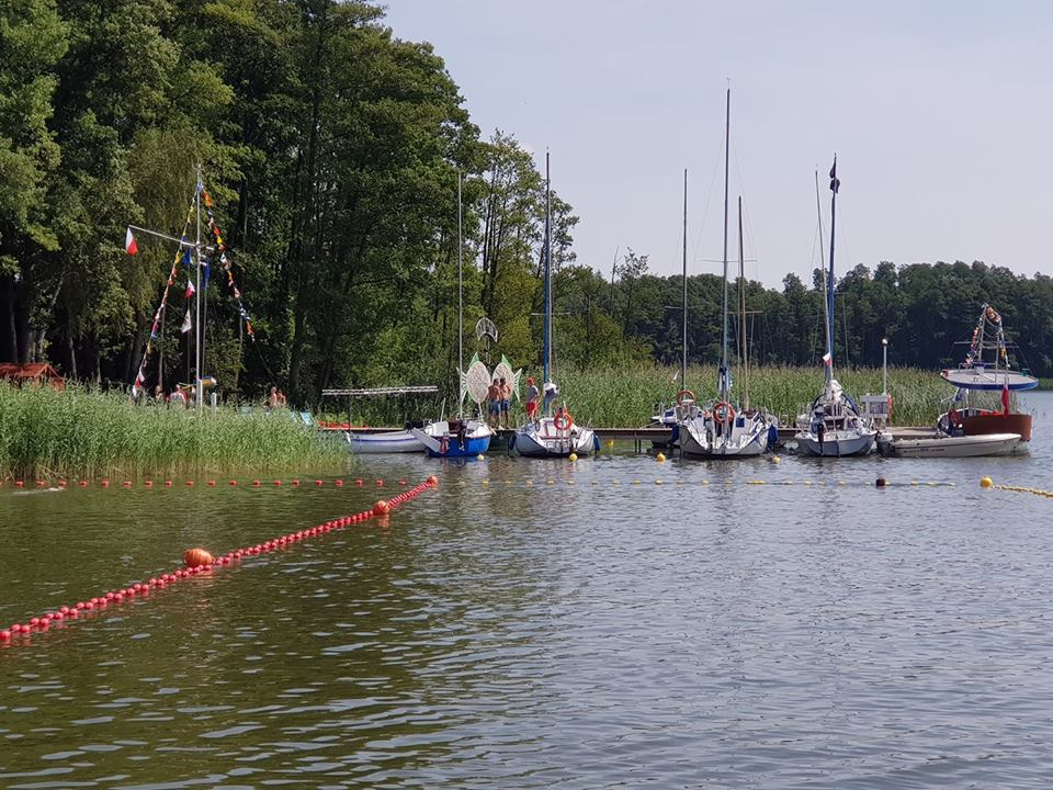 Jachty w "Marinie Ustronie" nad Jeziorem Wolsztyńskim w Karpicku